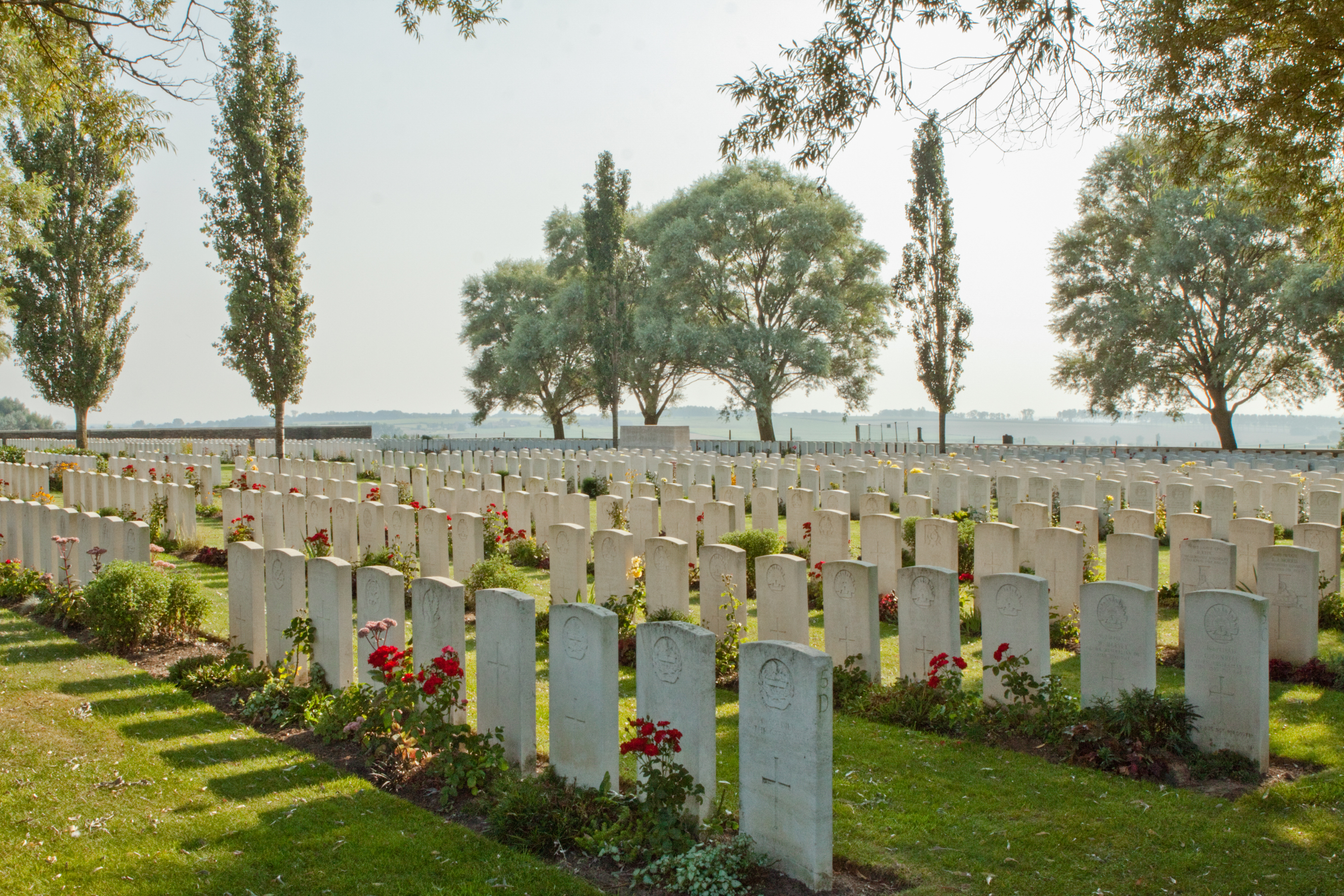 Messines Ridge British Cemetery